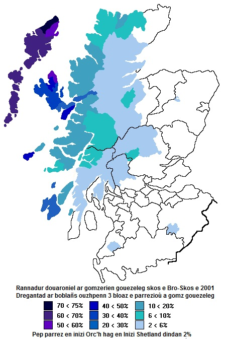 Kartenn dregantadoù ar gomzerien gouezeleg skos e 2001